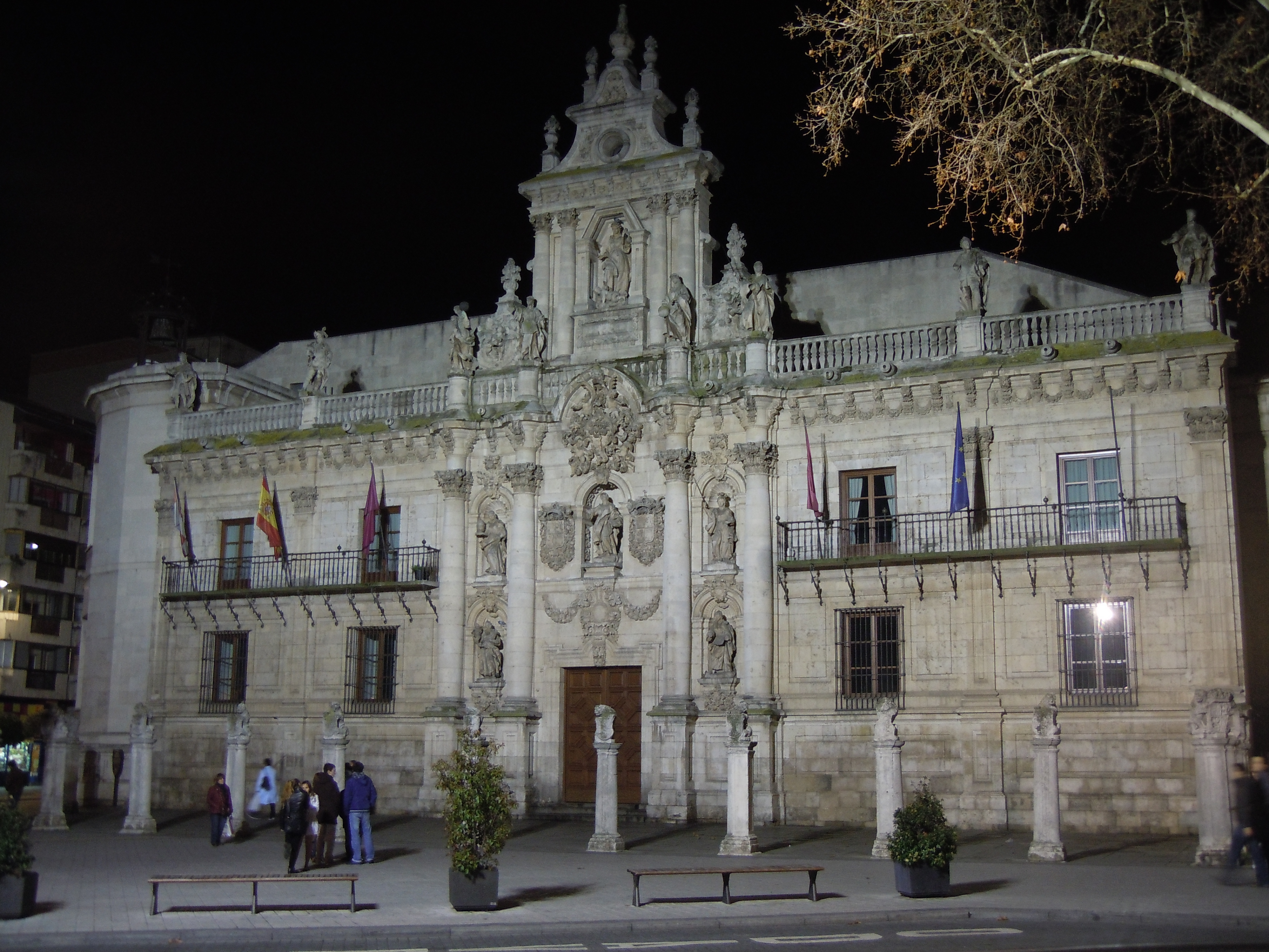 Fachada de la Facultad de Derecho de la Universidad de Valladolid, Valladolid (Spain).